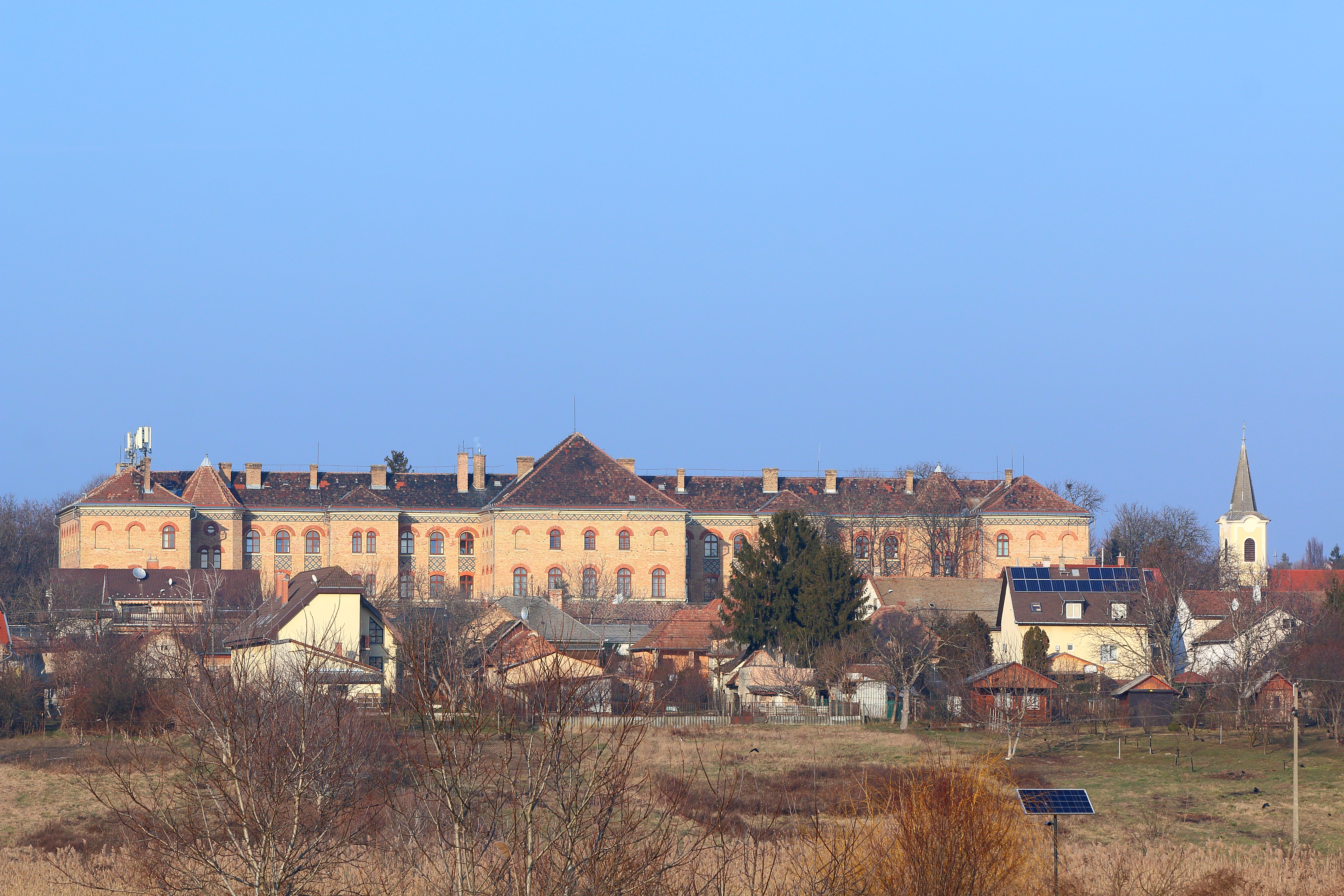 A Szerb Antal Gimnázium és az attól kicsit távolabb elhelyezkedő Mária Magdolna templom a Szilas-patak túlpartjáról